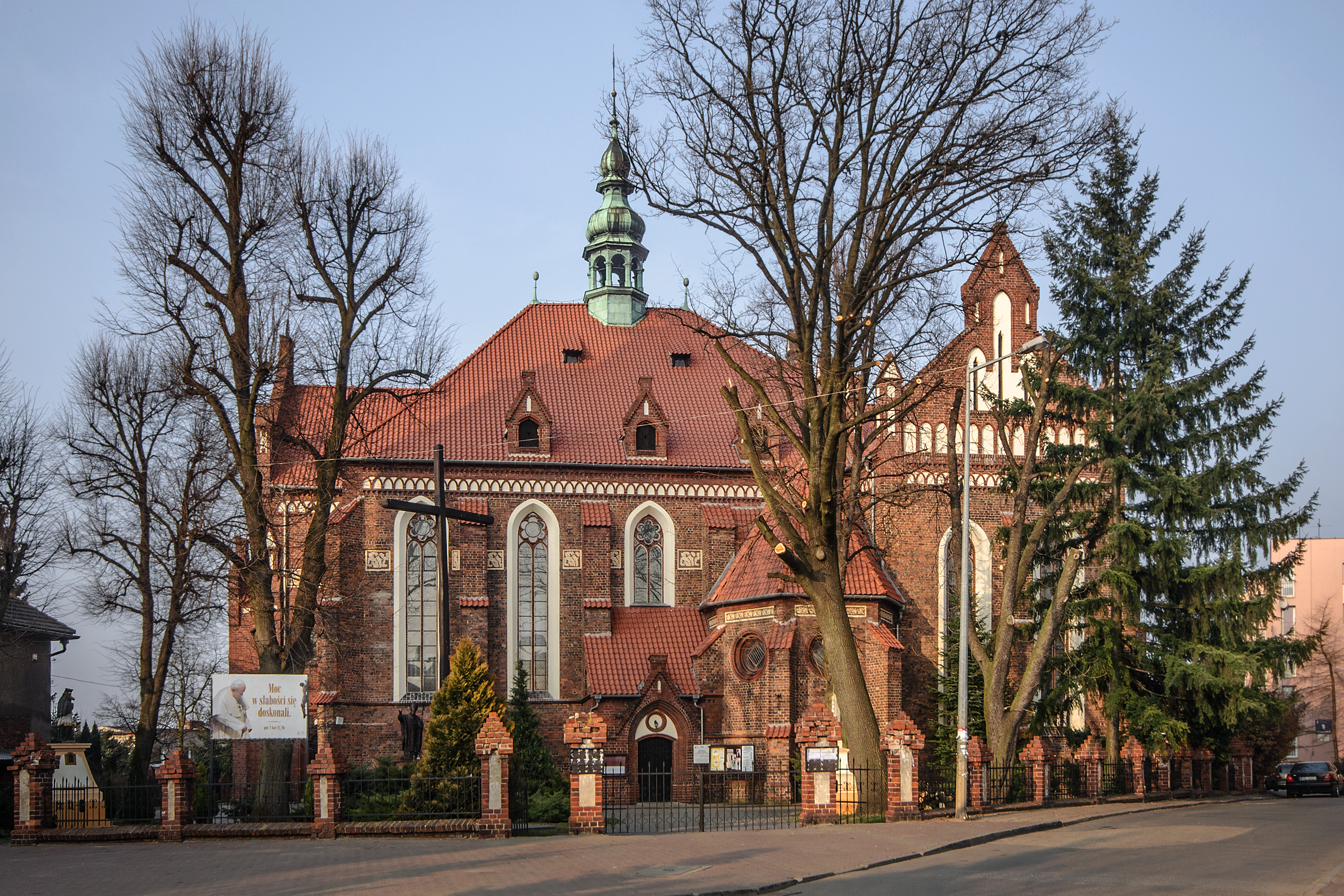 Syców, kościół par. p.w. śś. Piotra i Pawła, XV, 1815, 1908